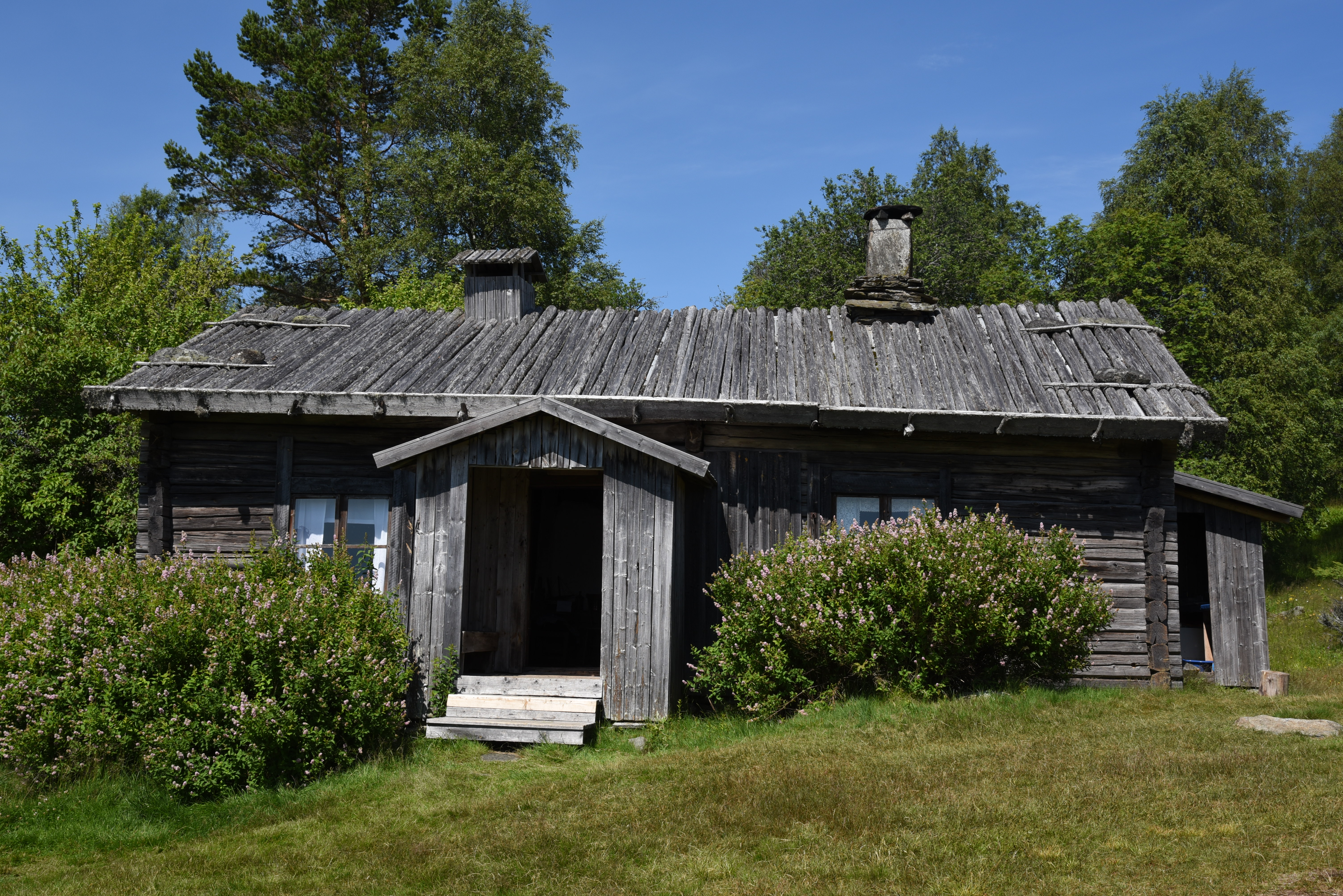 Ritamäki finngård i Torsby finnskog i Lekvattnets socken i Torsby kommun. Rökstugan